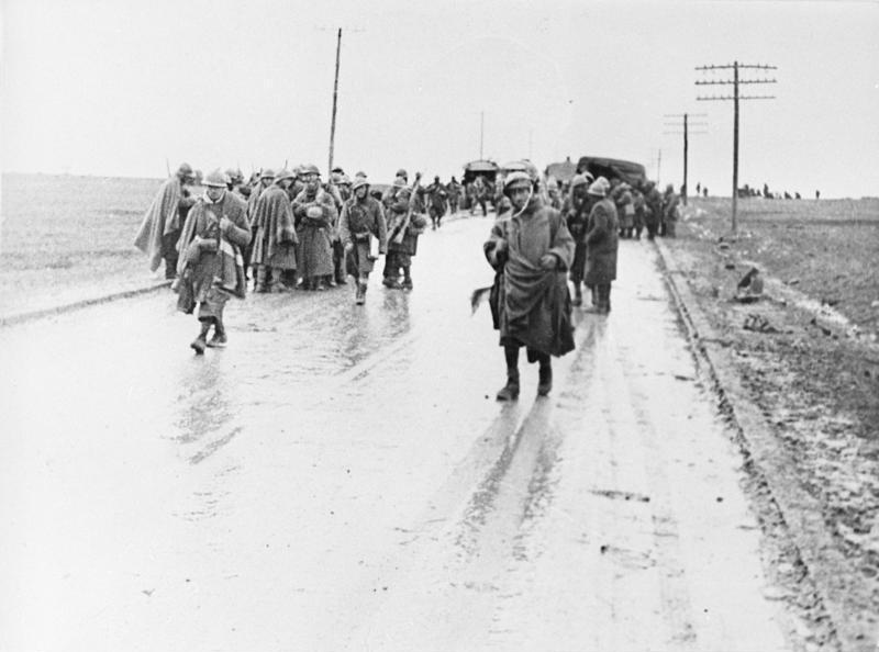 ADN-ZB Spanischer Freiheitskampf 1936 - 39 Anfang März 1937 begann die grosse Offensive der faschistischen Franco-Truppen auf Guadalajara, deren Hauptstoss auf der Strasse Madrid - Saragossa (Carretera de Aragon) geführt wurde.